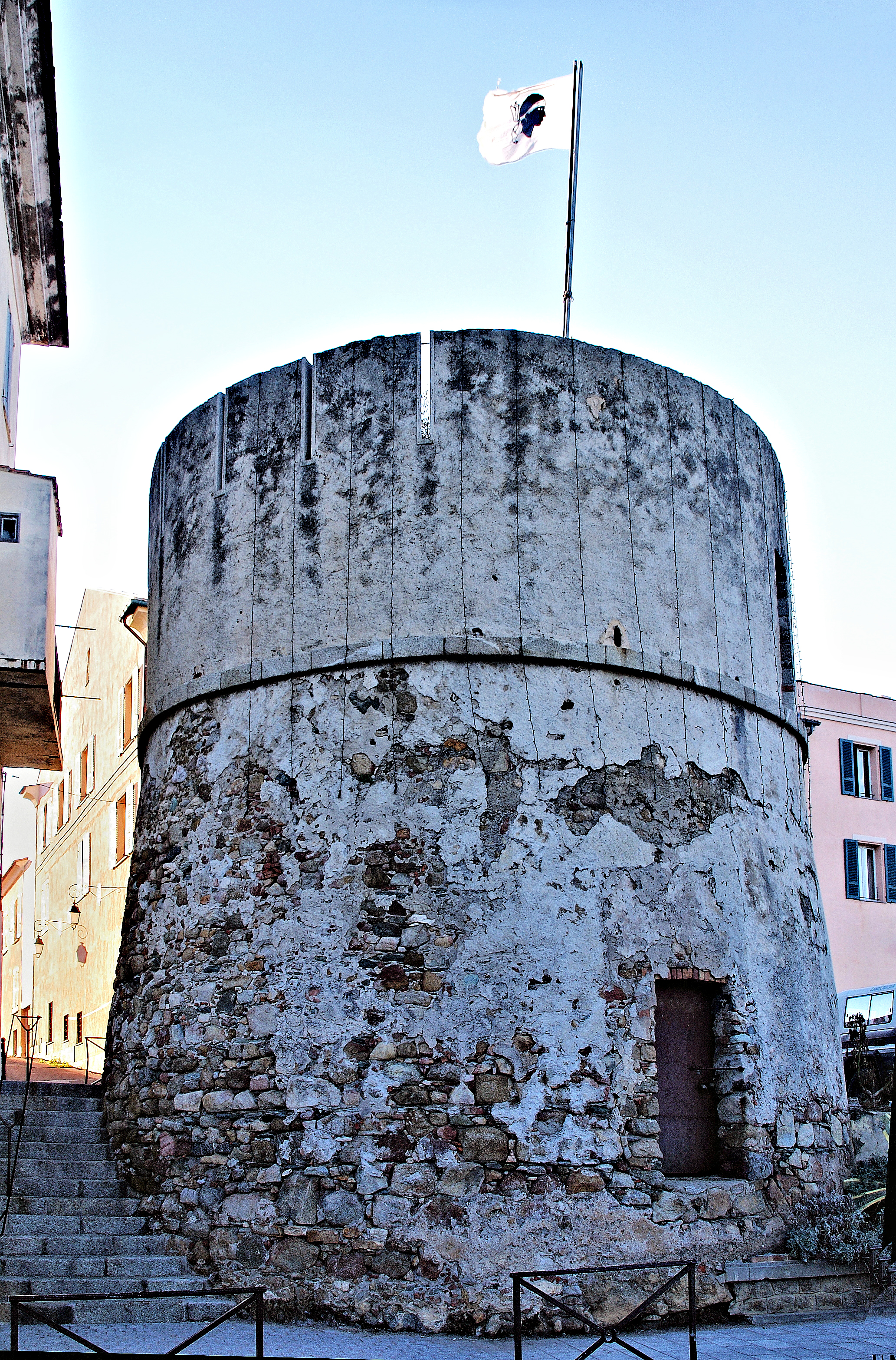 L'Île-Rousse, Balagne (Corse) - Tour de Scalu (XVIIe siècle), sur la Place de la Mairie.